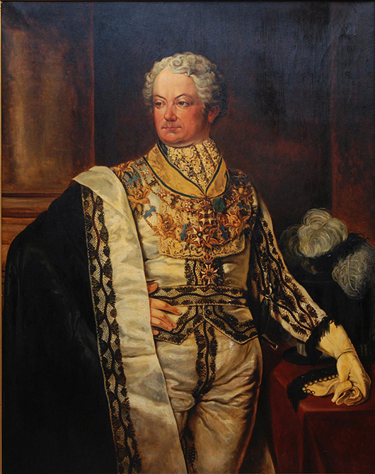 Gustaf Fredrik Wirsén (1779-1827) iklädd Serafimerordens ordensdräkt, samt bärandes runt halsen Serafimerordens och Nordstjärneordens kedjor, samt Svärdsordens kommendörskors. Målning av Johan Gustaf Sandberg, troligen 1820-tal.